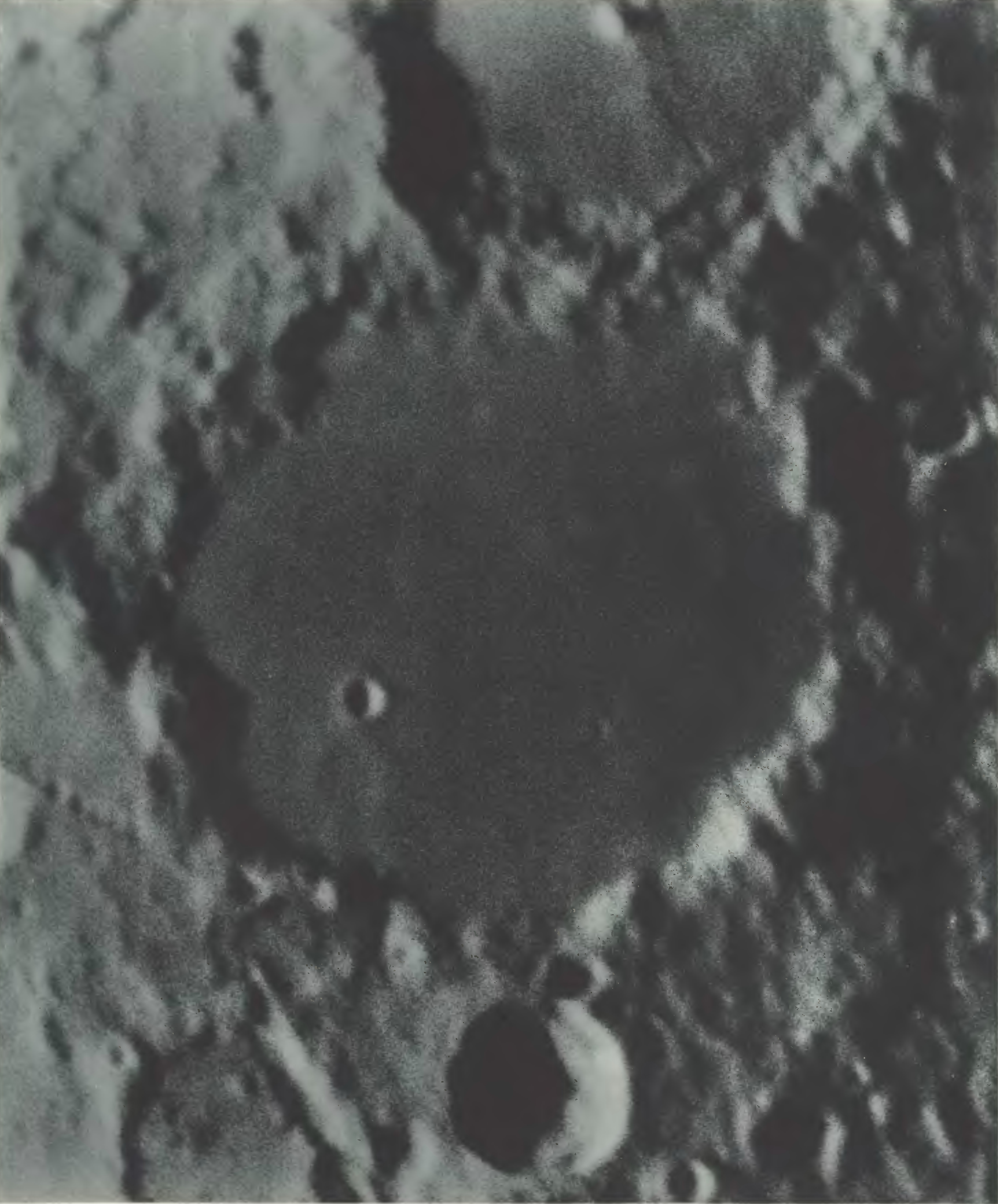 Photographischer Mond-Atlas vornehmlich auf Grund von focalen Negativen der Lick-Sternwarte im Massstabe eines Monddurchmessers von 10 Fuss ausgeführt von Professor Ladislaus Weinek. Heft I. Tafel 15